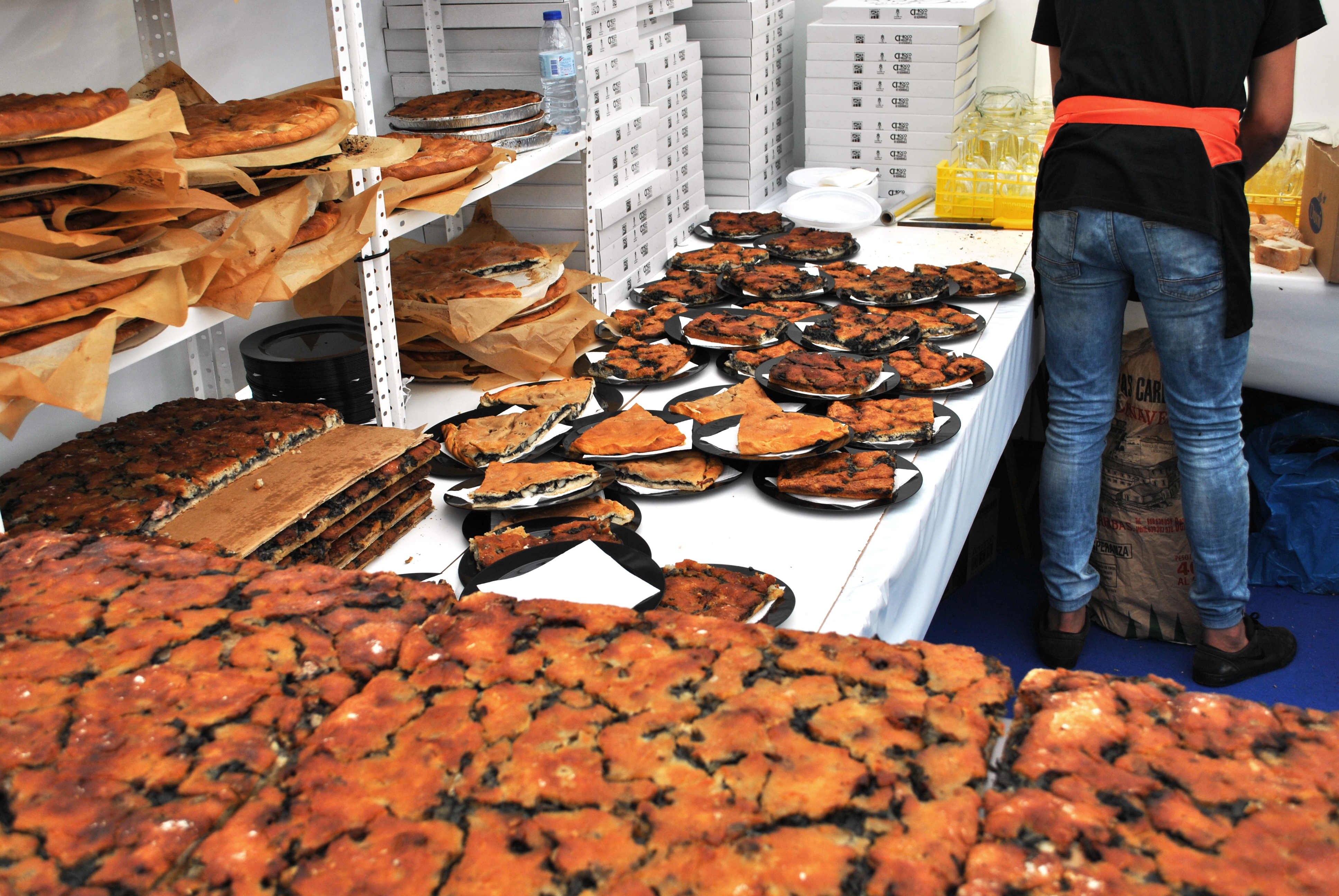 Véxase o título e as categorías.